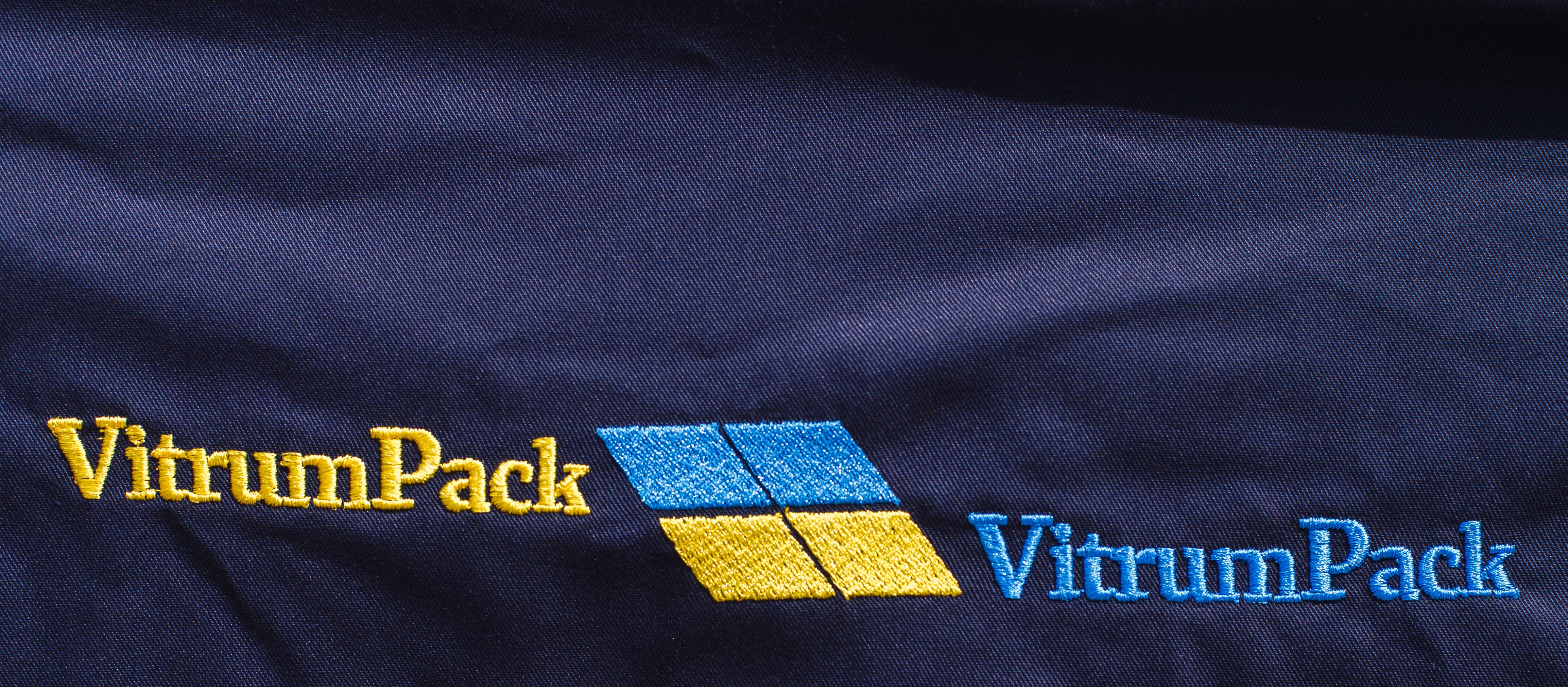 Компанія VitrumPack м.Кременчук